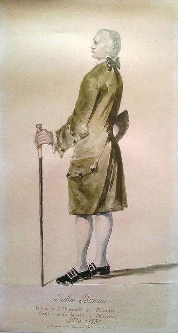 Julien Bureau (1725-1780), régent de la facultée de médecine de Nantes, recteur de l'Université, médecin des hôpitaux